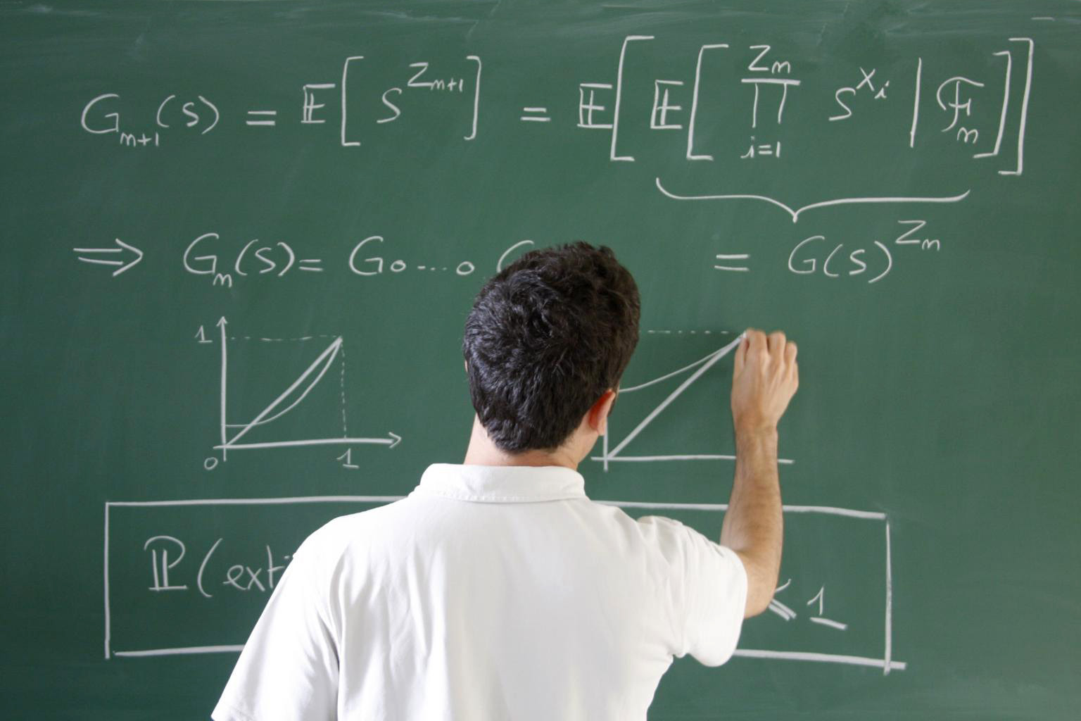 "généalogie de Galton-Watson" ou "modèle de Galton-Watson"